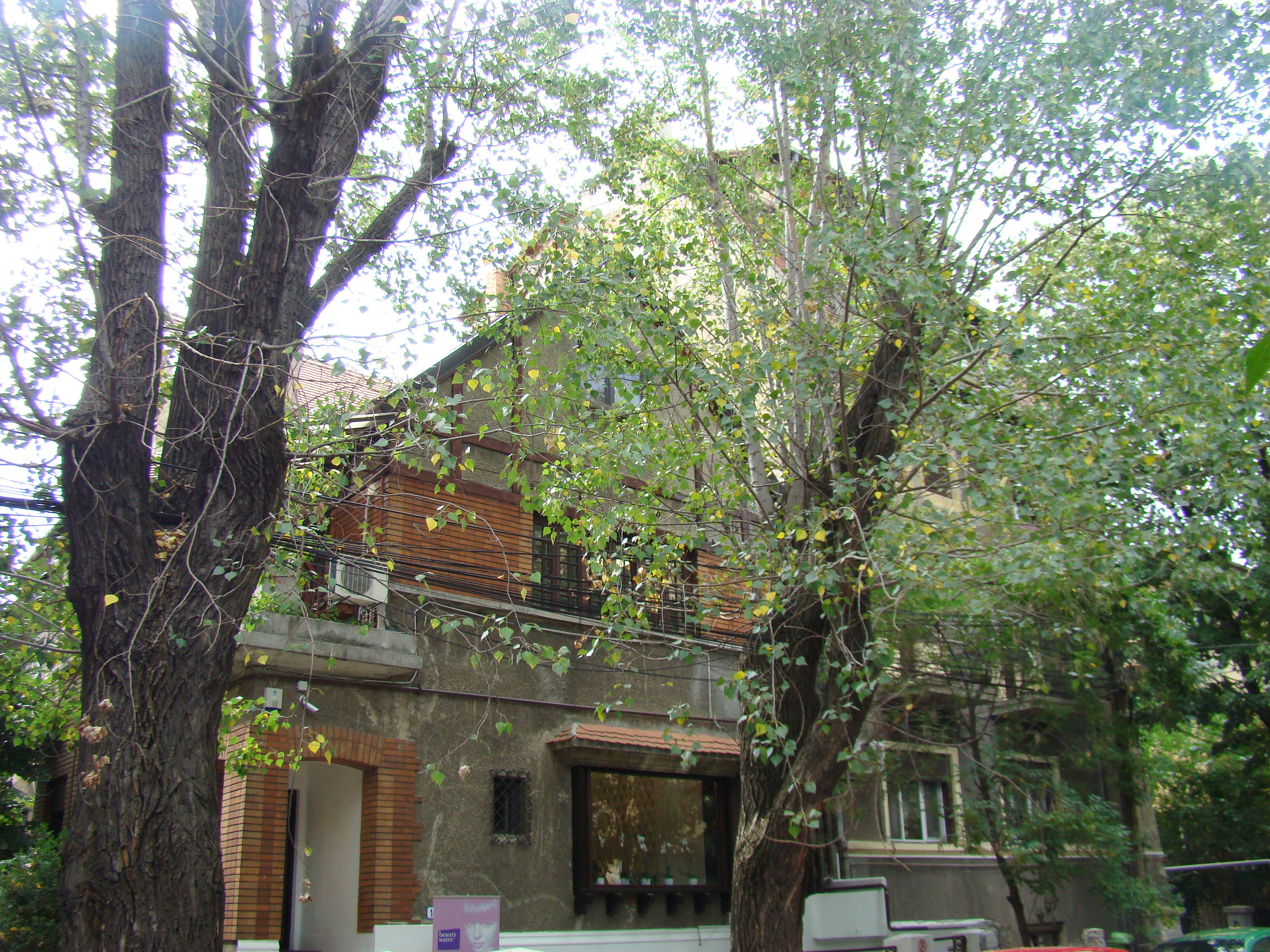 Casă monument istoric, str.Londra, nr. 19